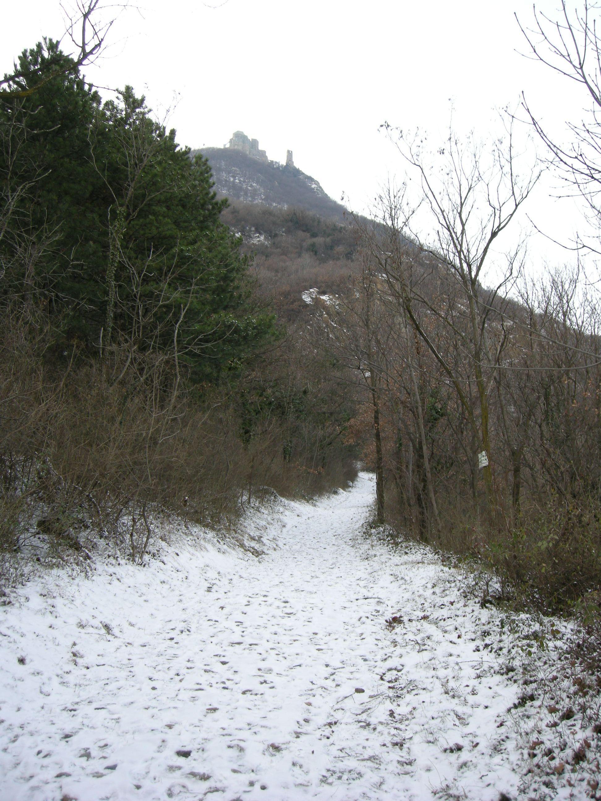 Mulattiera da sant'amborgio si torino alla sacra di san michele